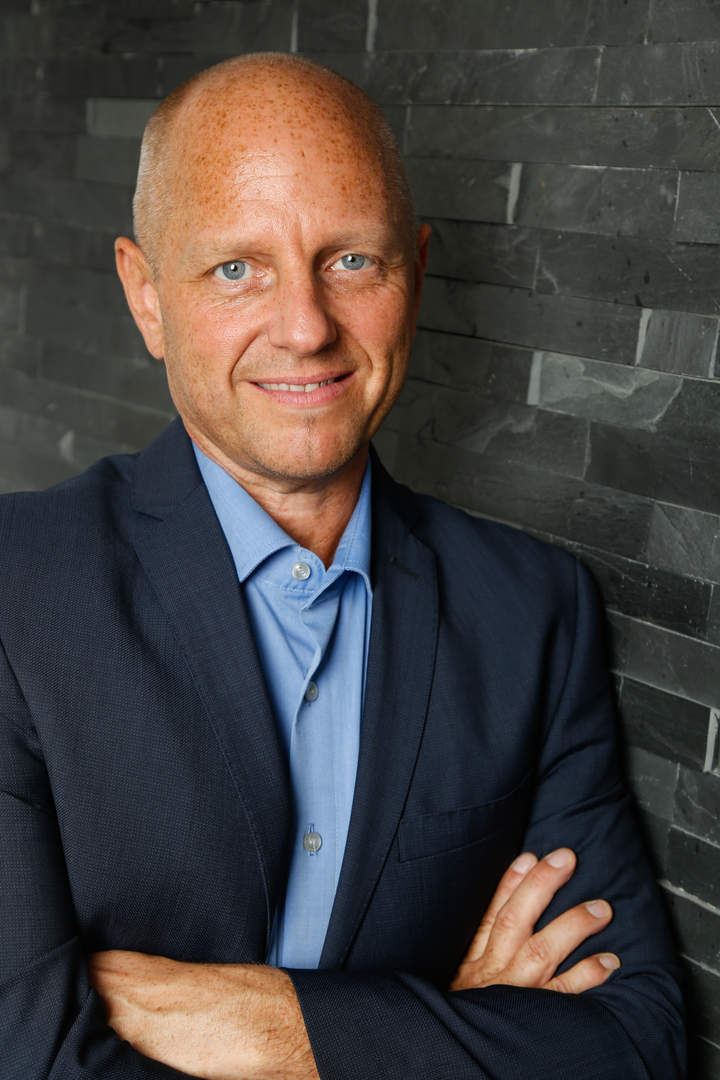 Eric Leiderer angelehnt an der Wand